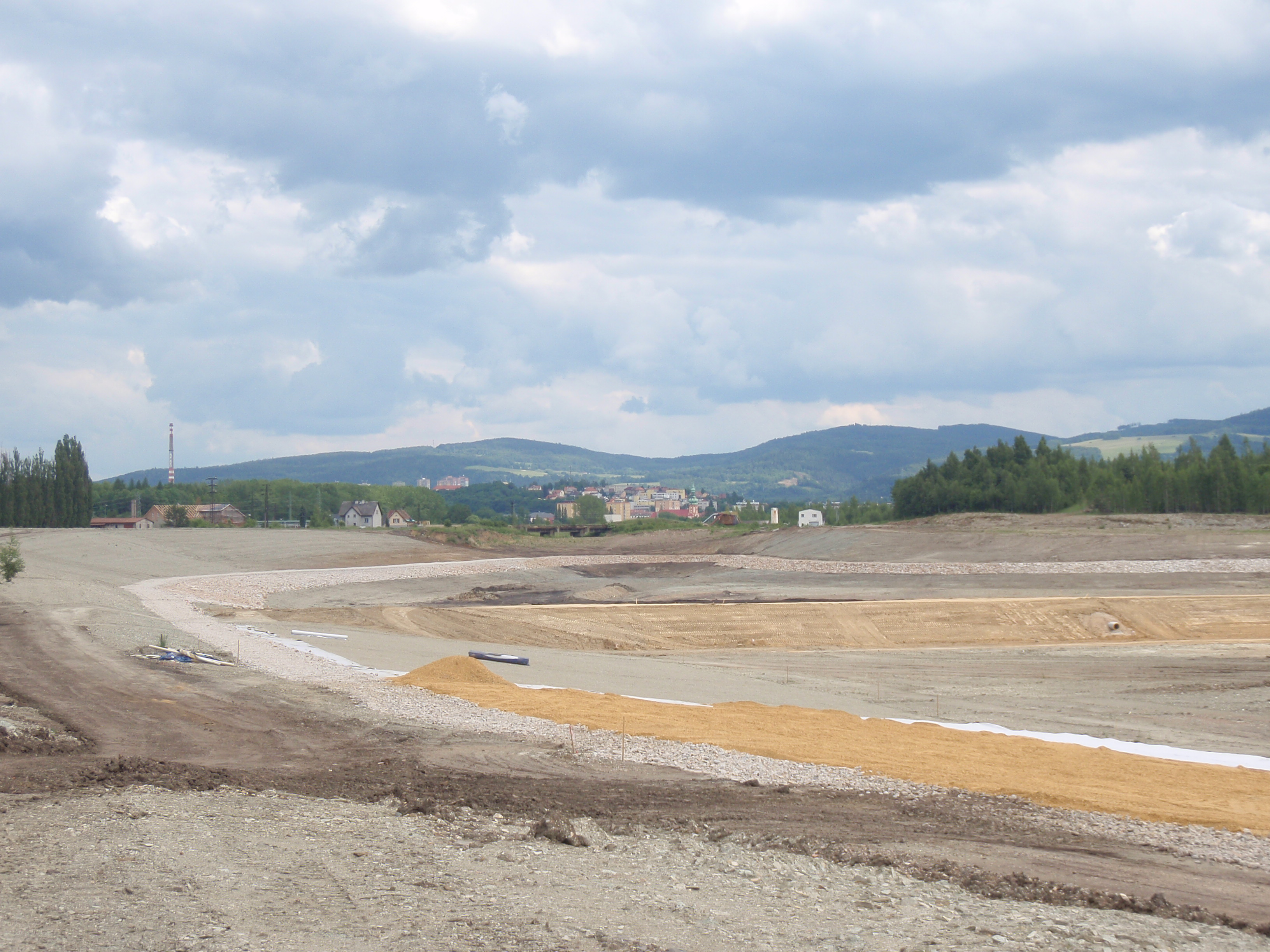 Budoucí přístav u Svatavy